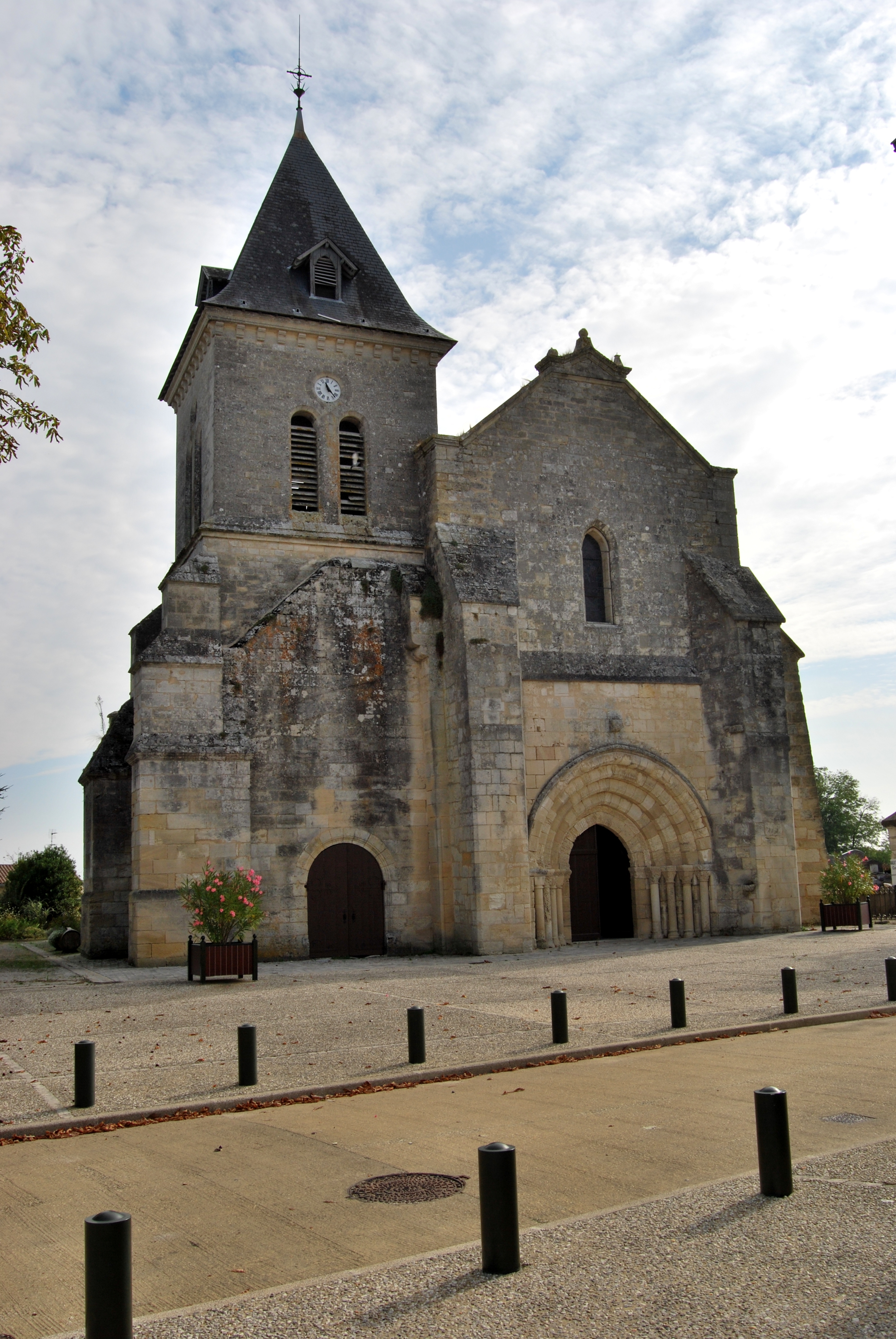 Église Saint-Pierre de Villegouge .